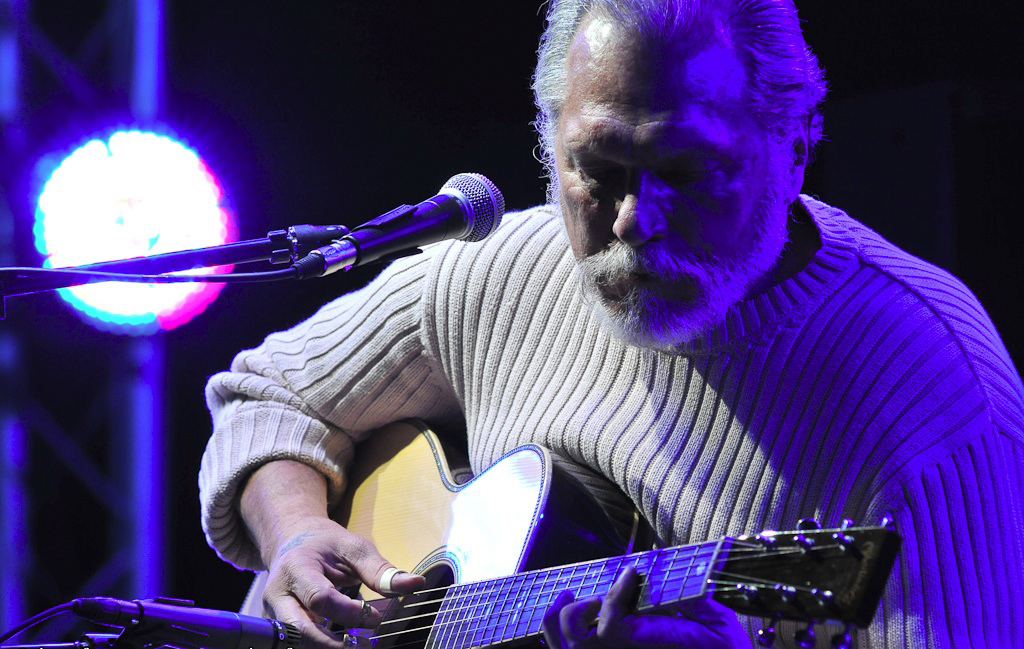 Jorma Kaukonen - Crossroads 2009 Crossroads Club Luca Fiaccavento - photographer Roma, Italy Osteria Nuova, Roma 25.10.2009 Jorma Kaukonen: chitarra acustica, voce Barry Mitterhoff: mandolino